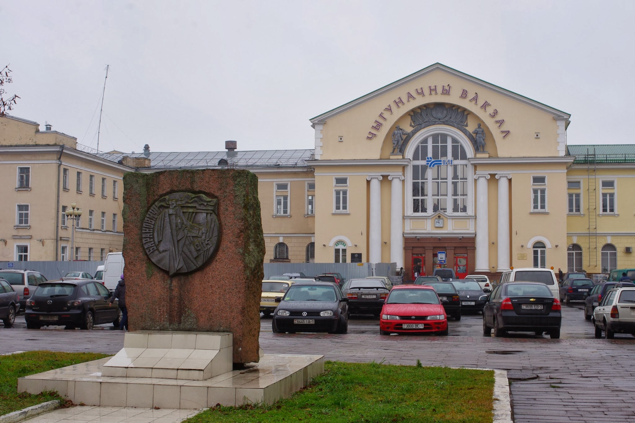 Baranavichy, Belarus